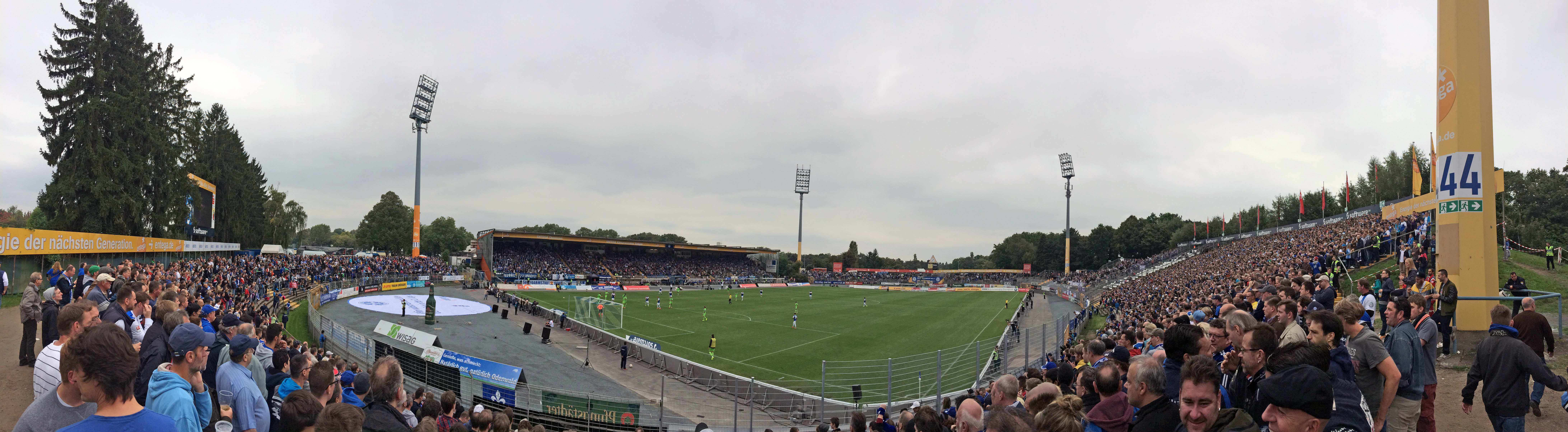 14.09.2014 Darmstadt 98 - Erzgebirge Aue 2:0 Stadion am Böllenfalltor